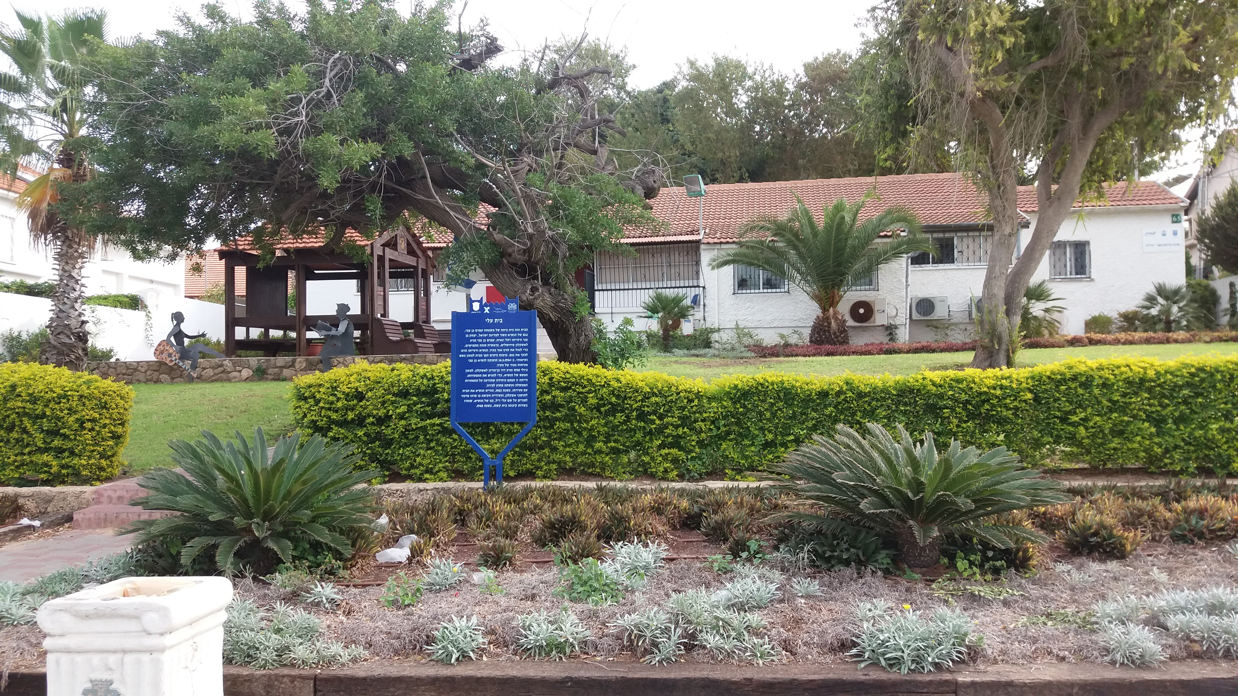 בית עלי בשכונת אפרידר באשקלון היה ביתם של הנשיא השני של מדינת ישראל, יצחק בן צבי, ושל רעייתו רחל ינאית. השניים רכשו אותו כבית נופש. הבית נקרא על שם בנם עלי שנהרג בשדות קיבוץ בית קשת שבגליל התחתון ב-1948. נכון ל-2017, בית עלי משמש כמקום להשתלמות והעשרה למורים ומחנכים בשם מרכז-פסג"ה בית עלי.